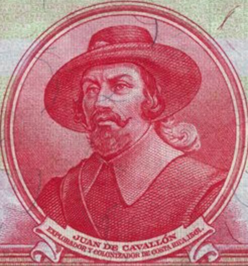 Dibujo a lápiz realizado en 1938 por Povedano del conquistador español Juan de Cavallón reproducido en 1941 por el grabador de la casa impresora Waterlow and Sons, de Londres, en el billete de 20 colones del Banco Nacional de Costa Rica, serie E.